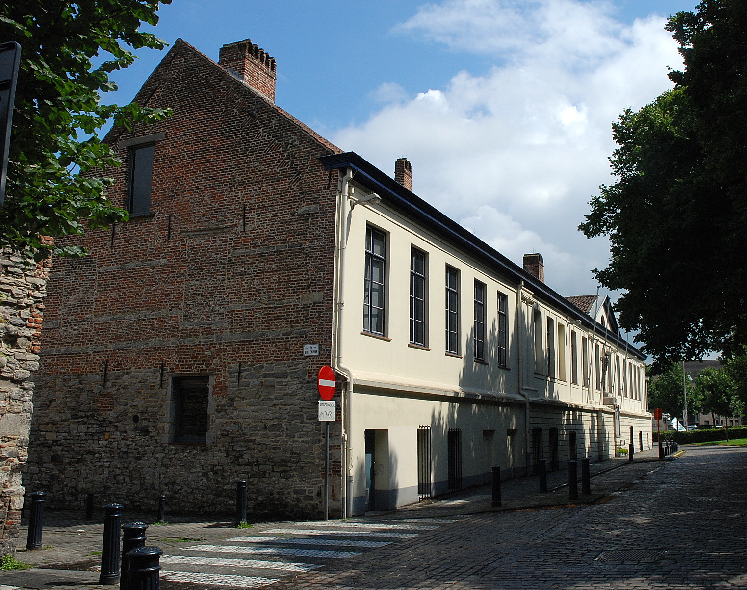 Spaans gouvernementshuis in Gent, België - deel van het Spanjaardenkasteel